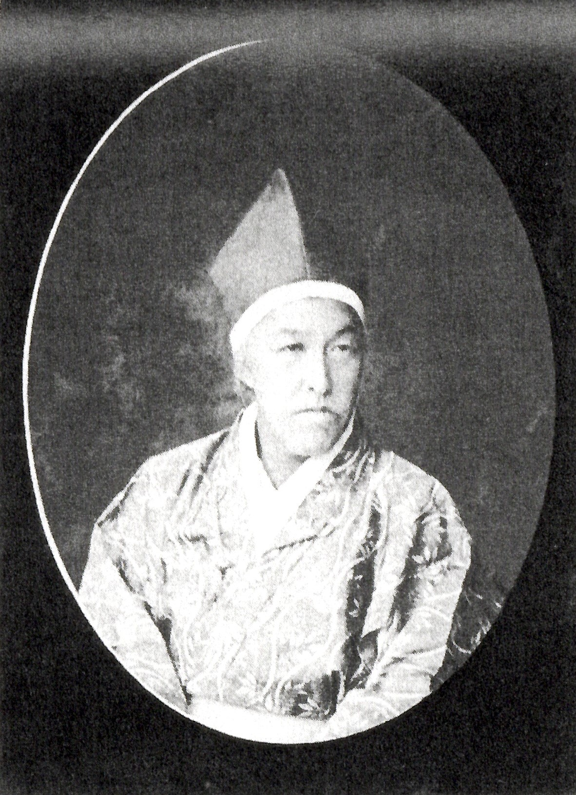 小笠原長守の肖像写真。